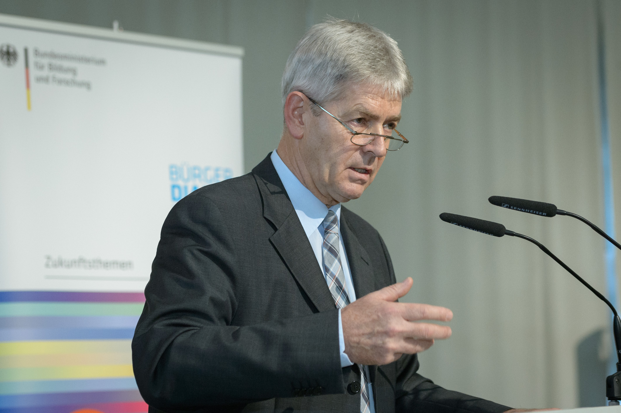 Oberbürgermeister Paul Krüger bei der Konferenz zum Bürgerdialog Demografischer Wandel des Bundesministeriums für Bildung und Forschung (BMBF) in der Stadthalle Neubrandenburg, November 2012